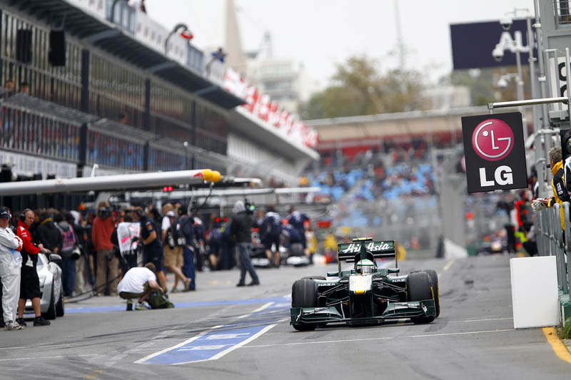 La Lotus T128 lors des essais libres 1 du Grand Prix d'Australie 2011